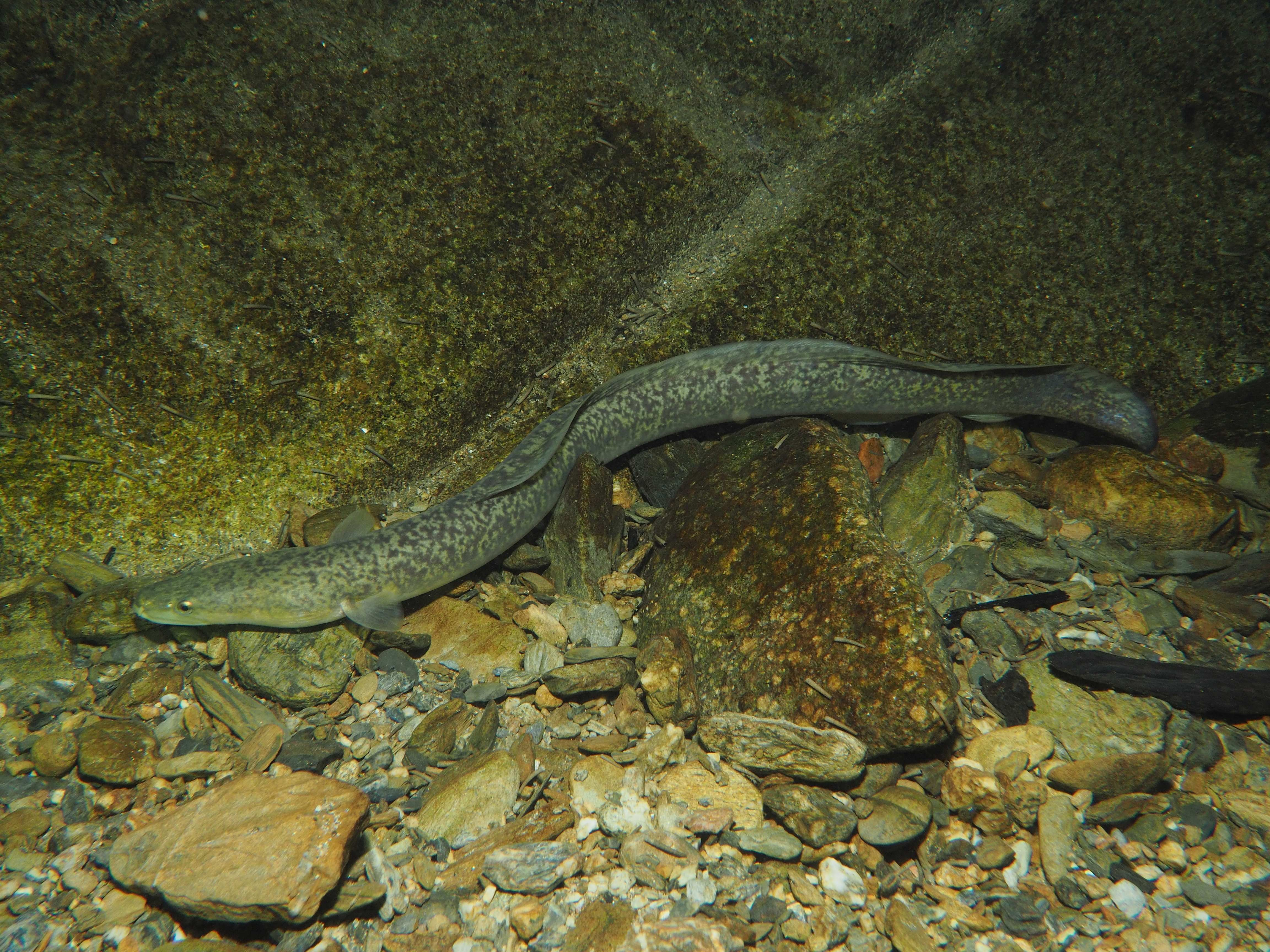 オオウナギ、沖縄島。全長80cmほど。詳細